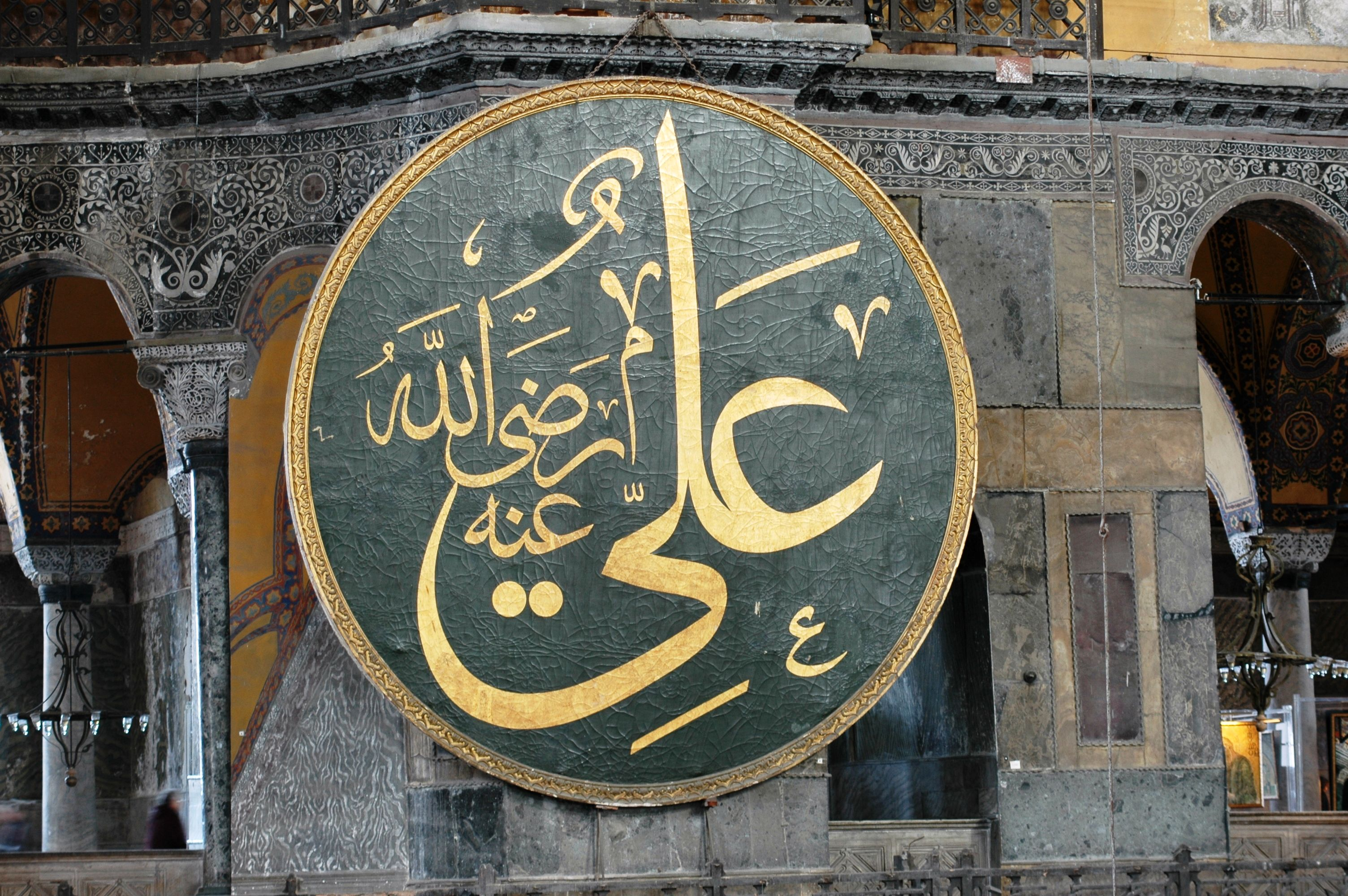 Istanbul - Santa Sofia - Medalló